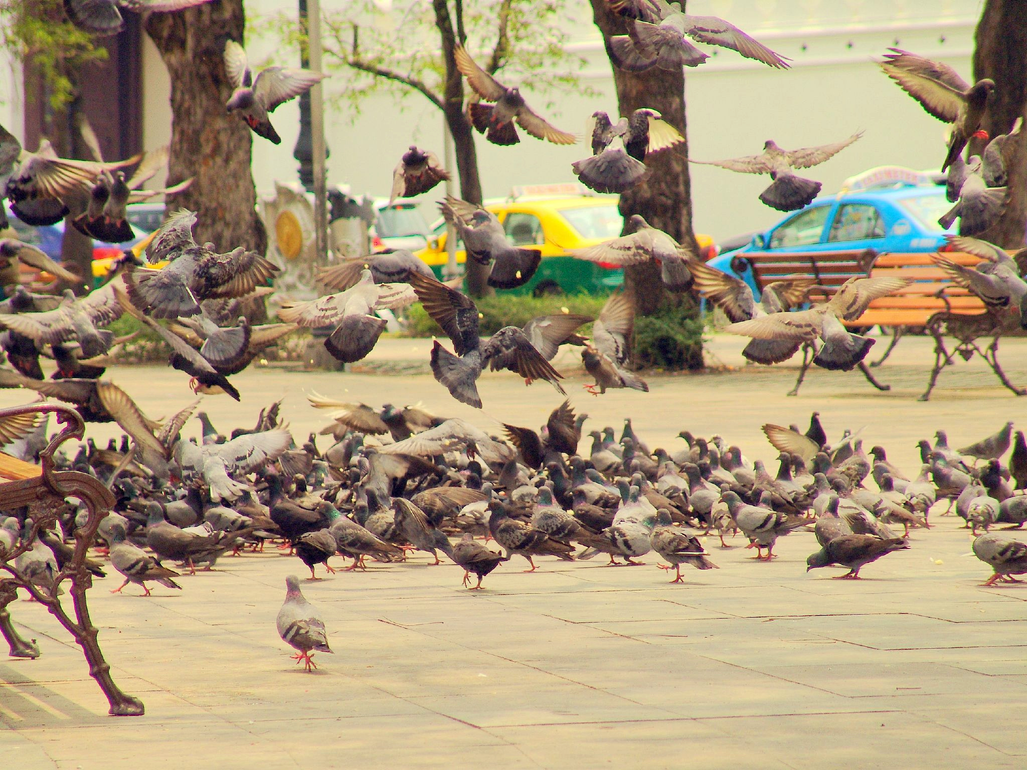 birds in Bangkok